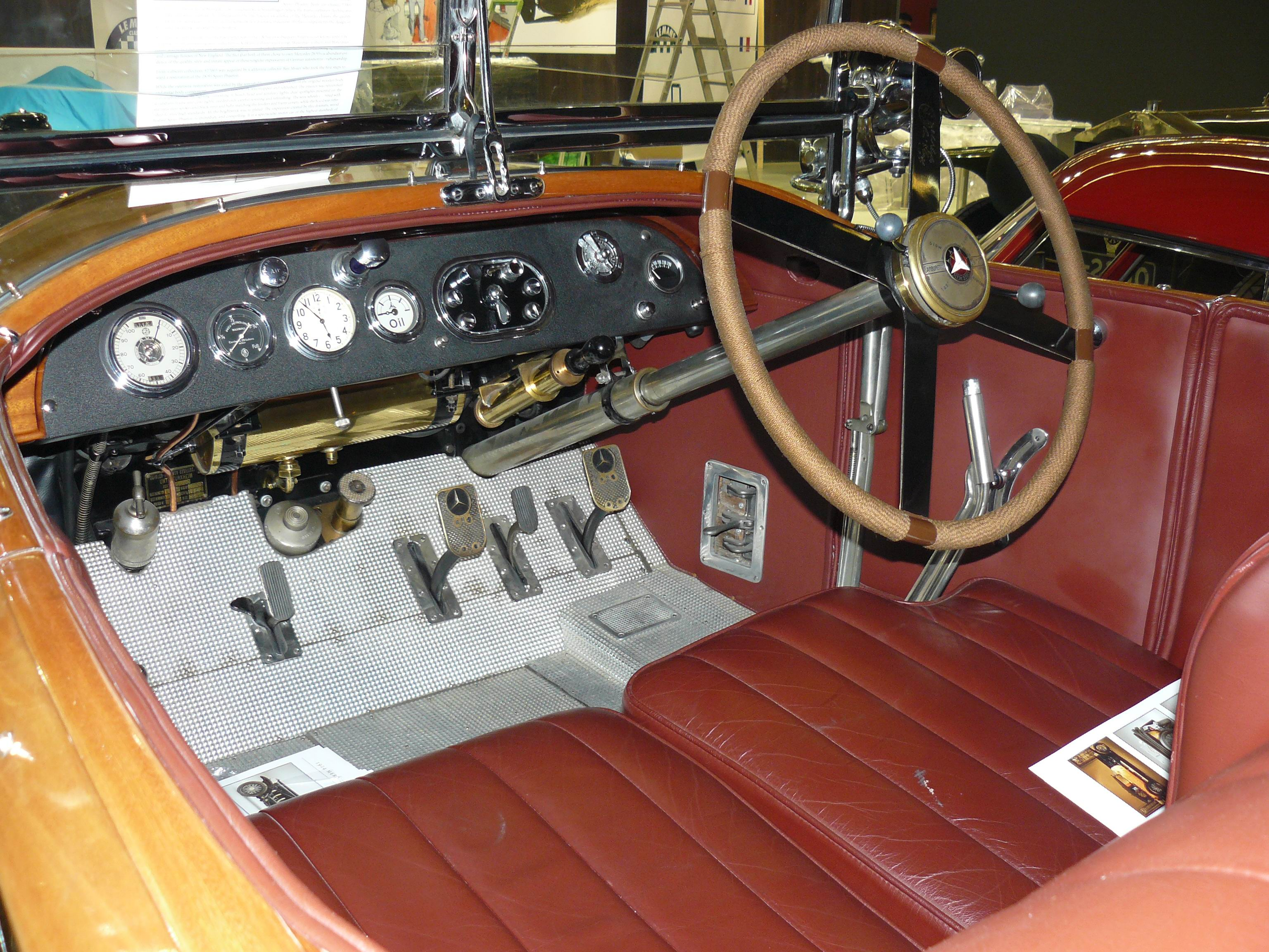 Retromobile 2013